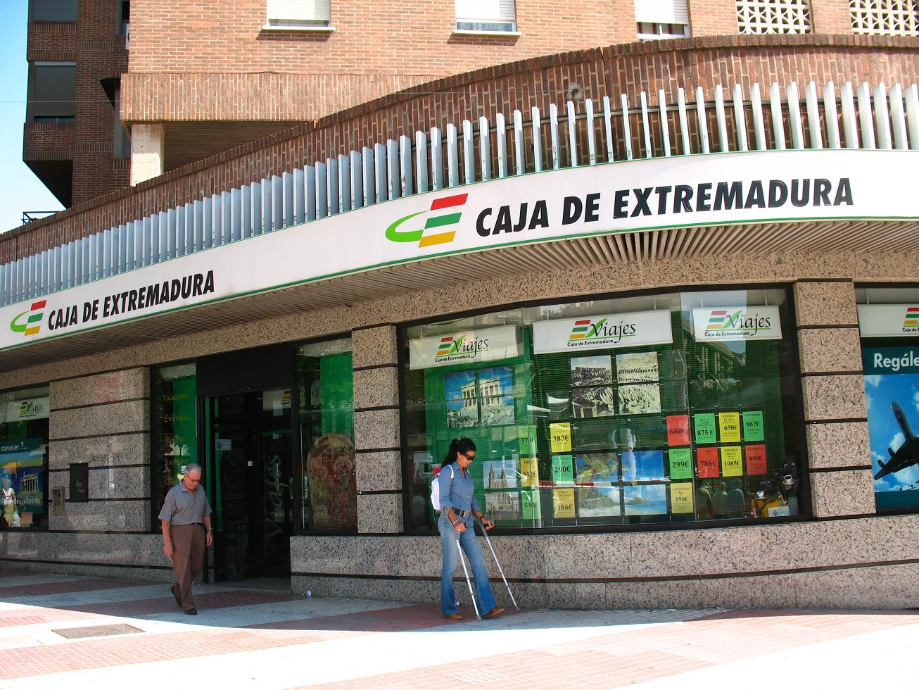 Oficina de la Caja de Extremadura en la ciudad de Cáceres